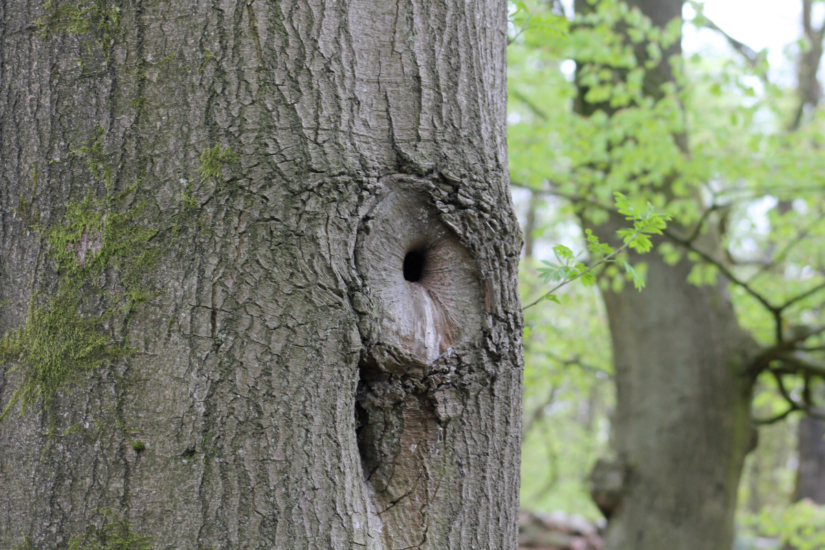 Boomholte